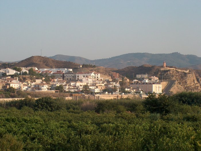 Panorámica de Arboleas, Almería, España.